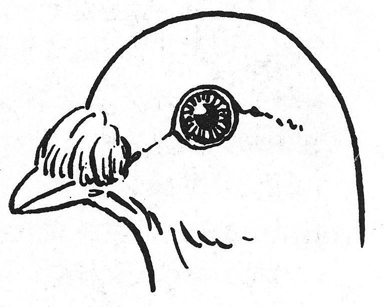 Federbildung am Kopf von Haustauben: Schnabelnelke (BUNGARTZ, 1922)